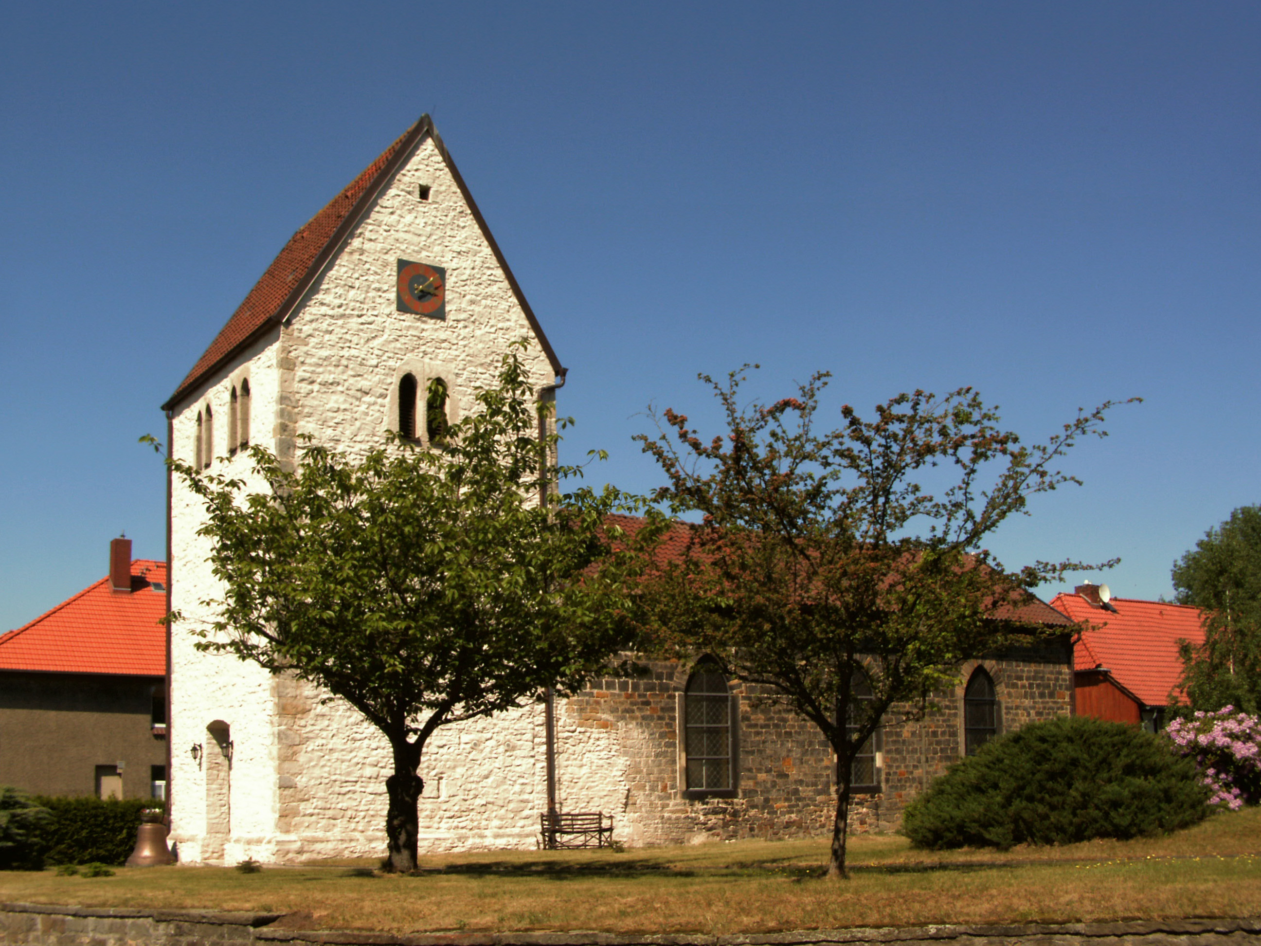 Evangelische Johannes-Baptista-Kirche in Rickensdorf, Ortsteil von Bahrdorf.